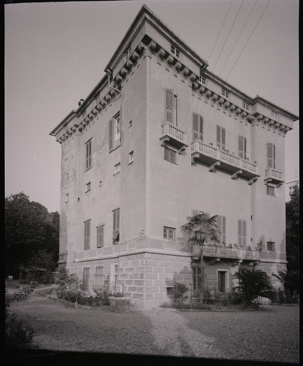 Servizio fotografico : Genova, 1964 / Paolo Monti. - Buste: 4, Fototipi: 4 : Negativo b/n, gelatina bromuro d'argento/ pellicola ; 10x12. - ((Serie costituita da 4 buste sciolte di negativi identificati con i nn.: 7813, 7814, 7815, 7816. - Il negativo identificato con il numero 46397 è stato realizzato per Zodiac. - Occasione: Documentazione per la pubblicazione: Italia Nostra (a cura di), "Le ville genovesi", catalogo della mostra, Genova 1962, Genova, Comune di Genova, 1967. - Fonte: Monografia di Italia Nostra (a cura di): Le ville genovesi, catalogo della mostra, Genova 1962, Genova, Comune di Genova (1967). - Fonte: Lettera di Paolo Monti: I. Carteggi/ Genova - Enrico (1963-1966), presso Archivio Paolo Monti. Camicia con documenti dattiloscritti e manoscritti vari relativi al lavoro eseguito per Italia Nostra: preventivi, lettere, inventari. - Fonte: Rubrica di Paolo Monti: Archivio fino 1-4-1961/ 31-3-1963 (1961-1963), presso Archivio Paolo Monti. - Fonte: Agenda di Paolo Monti: R 1 - Monti/ 1 aprile 1963 - 6 giugno 1964/ 6000-8193 (1963-1964), presso Archivio Paolo Monti